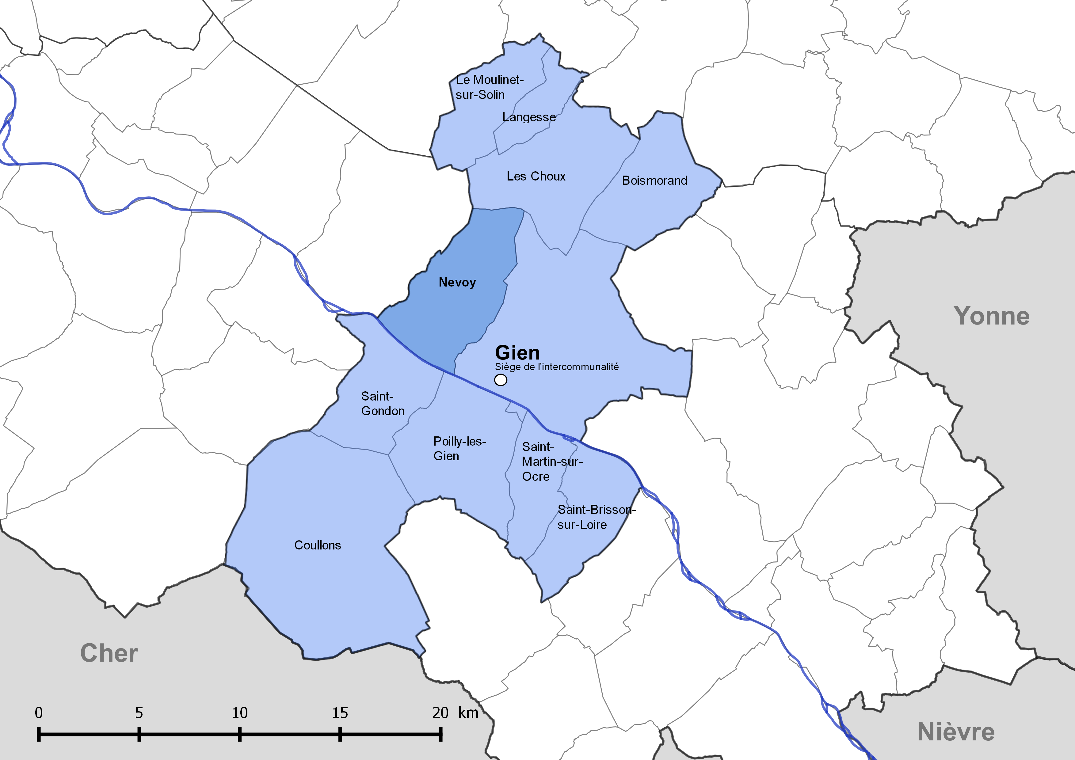 Périmètre de la communauté des communes giennoises - Situation de la commune de Nevoy.